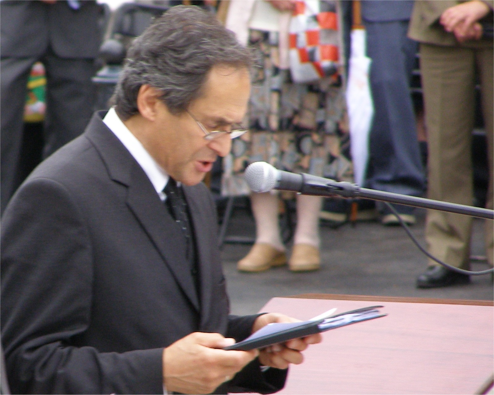 Jerzy Zelnik podczas obchodów 62. rocznicy powstania warszawskiego, Warszawa 1 sierpnia 2006.